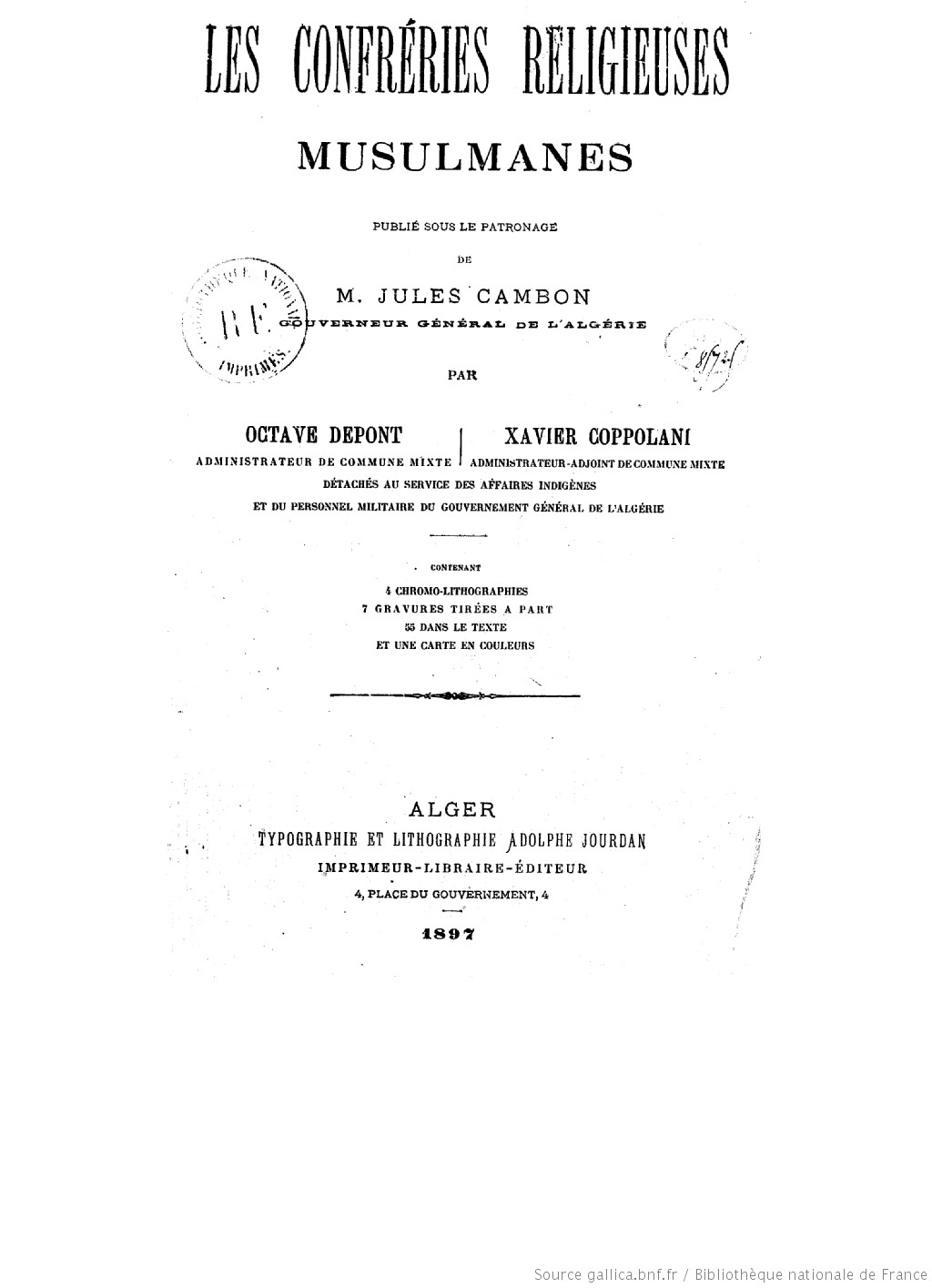 Les confréries religieuses musulmanes, Octave Depont, Xavier Coppolani, Jourdan, 1897, couverture.